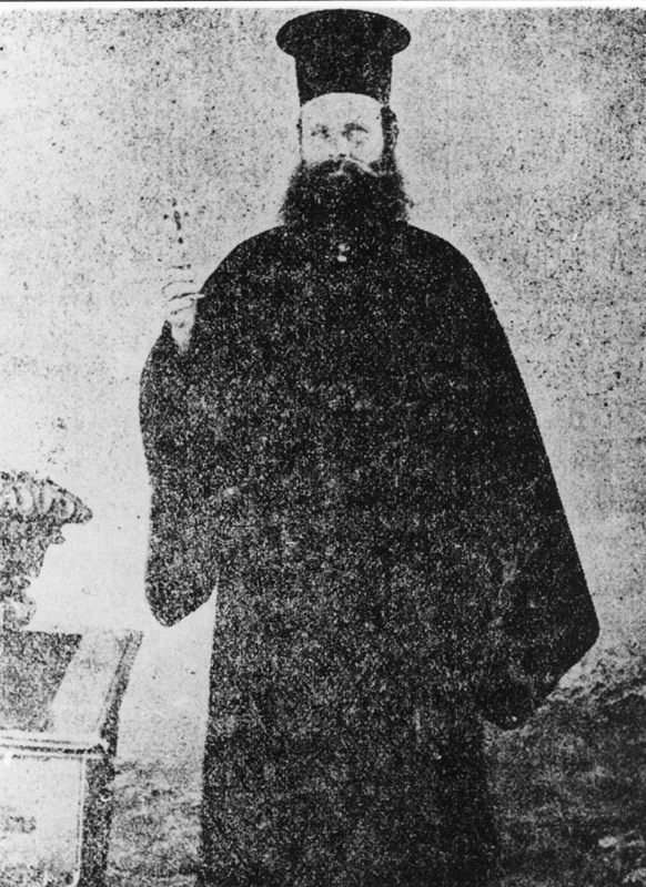 Константинос Папапасхалис